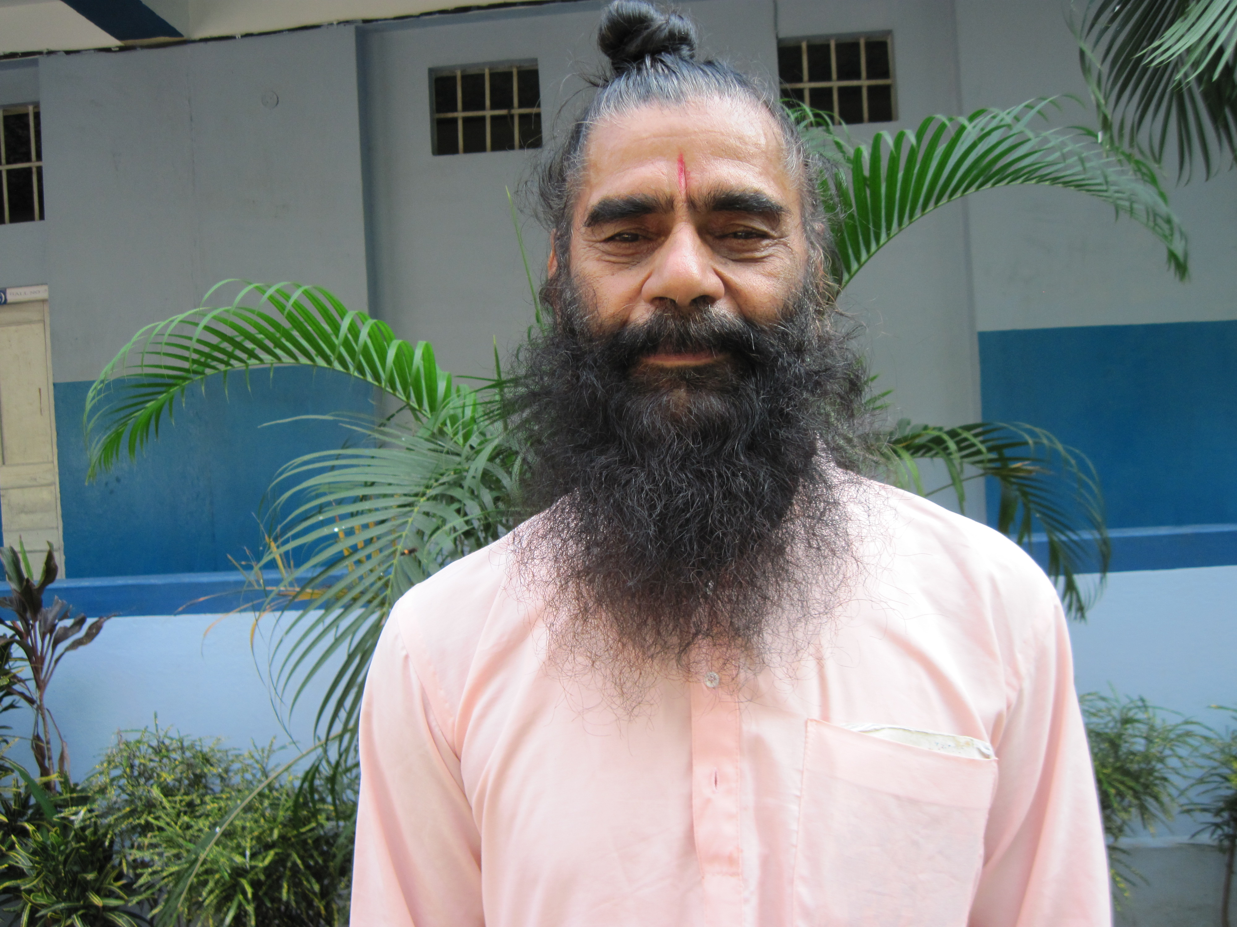 नेपाली: त्रिफला राष्ट्रिय सुस्तकालय, धुलाबारी (मेचीनगर) का संस्थापक प्रेमप्रकाश फलाहारी समाज सेवी व्यक्ति हुन् । उनी अन्न र नुन खाँदैनन् । फलाहार मात्र गर्छन् । उनी समाजसेवी सन्त हुन् ।